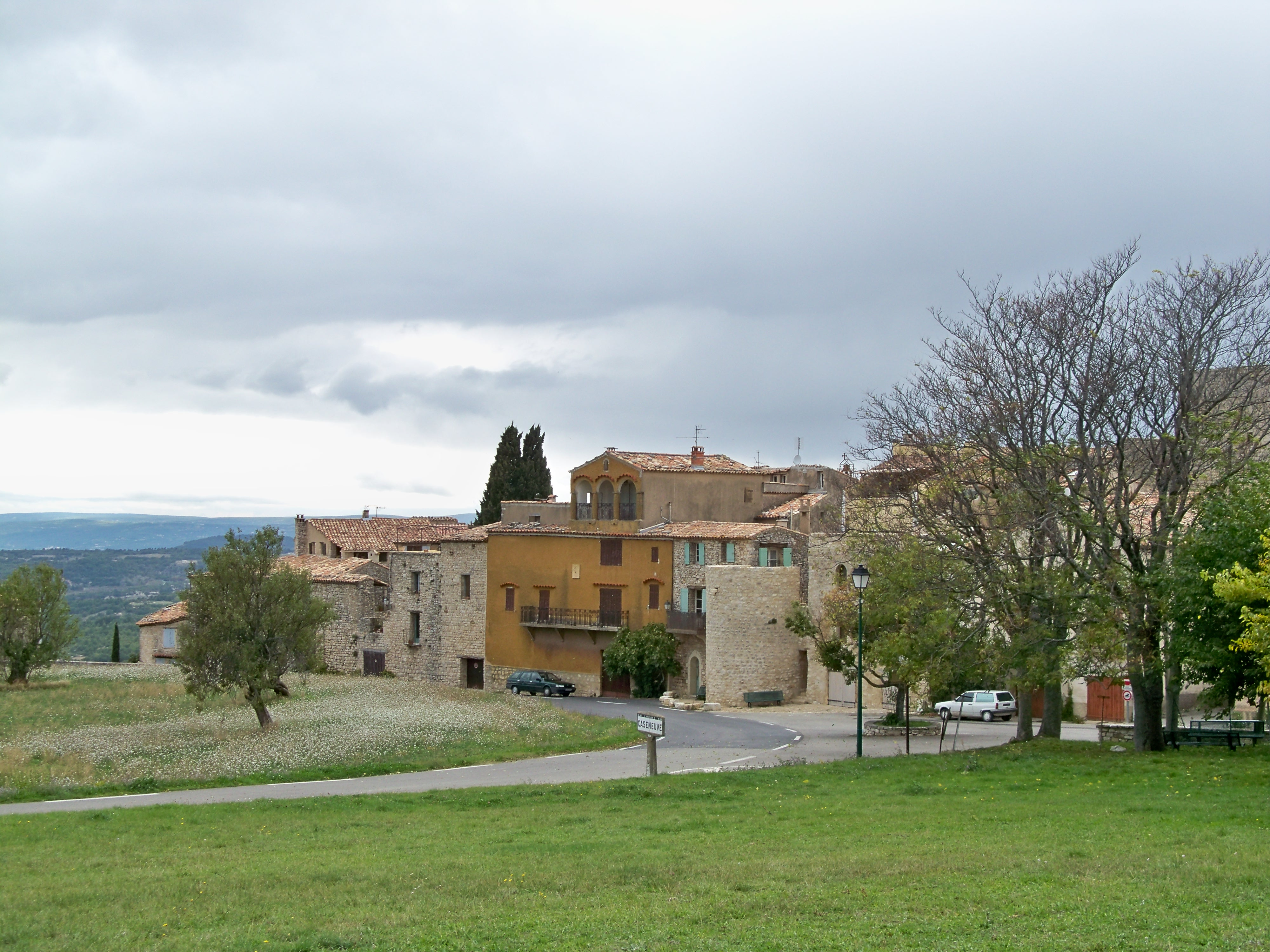 village de Caseneuve, Vaucluse, France